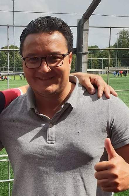 Juan Viedma Schenkhuizen